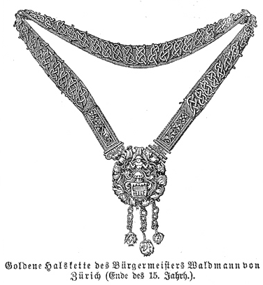 Goldene Halskette des Bürgermeisters Hans Waldmann von Zürich (Ende des 15. Jahrh.)